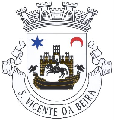 Brasão: escudo de prata, castelo de negro lavrado de ouro, aberto e iluminado do campo, tendo na porta, em grande arco abatido, cavaleiro envergando armadura completa com elmo e sua montada, tudo de negro, realçado de prata; acantonados em chefe, estrela de seis pontas de azul e minguante de vermelho; em ponta, barco de negro realçado de ouro, com dois corvos de negro, o da dextra volvido, um à proa e outro na popa. Coroa mural de prata de quatro torres. Listel branco, com a legenda a negro: «S. VICENTE da BEIRA».